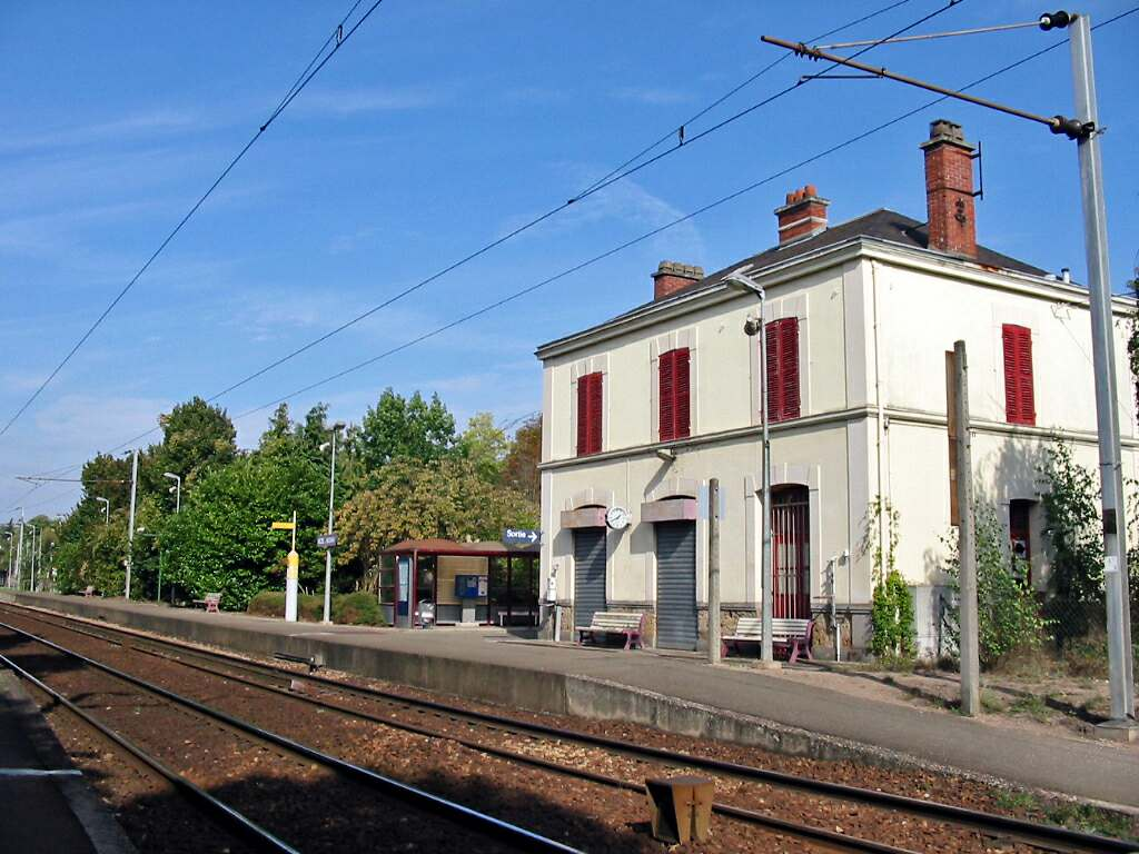 Gare de Nézel-Aulnay (Yvelines) Photo JH Mora, octobre 2005 Nezel-Aulnay catégorie:Image d'Aulnay-sur-Mauldre catégorie:Image de Nézel